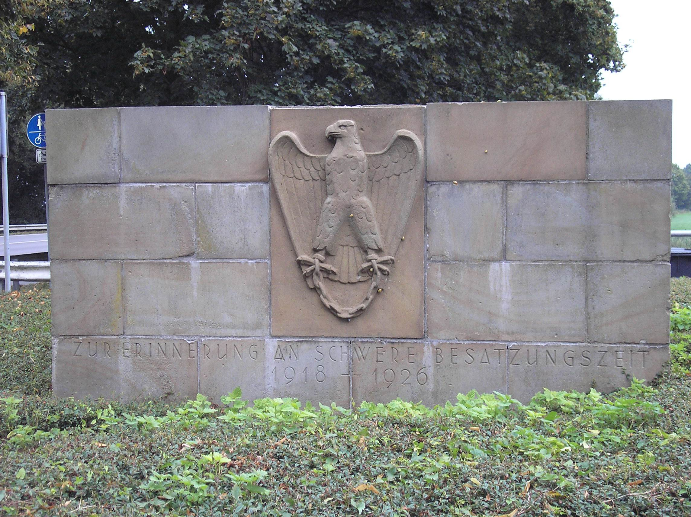 Denkmal für die belgische Besatzung am Niederrhein in Kleve-Kellen bei Haus Schmithausen. Vorderseite. Text: Zur Erinnerung an schwere Besatzungszeit 1918 - 1926. Gestaltet wurde das Denkmal von Arno Breker